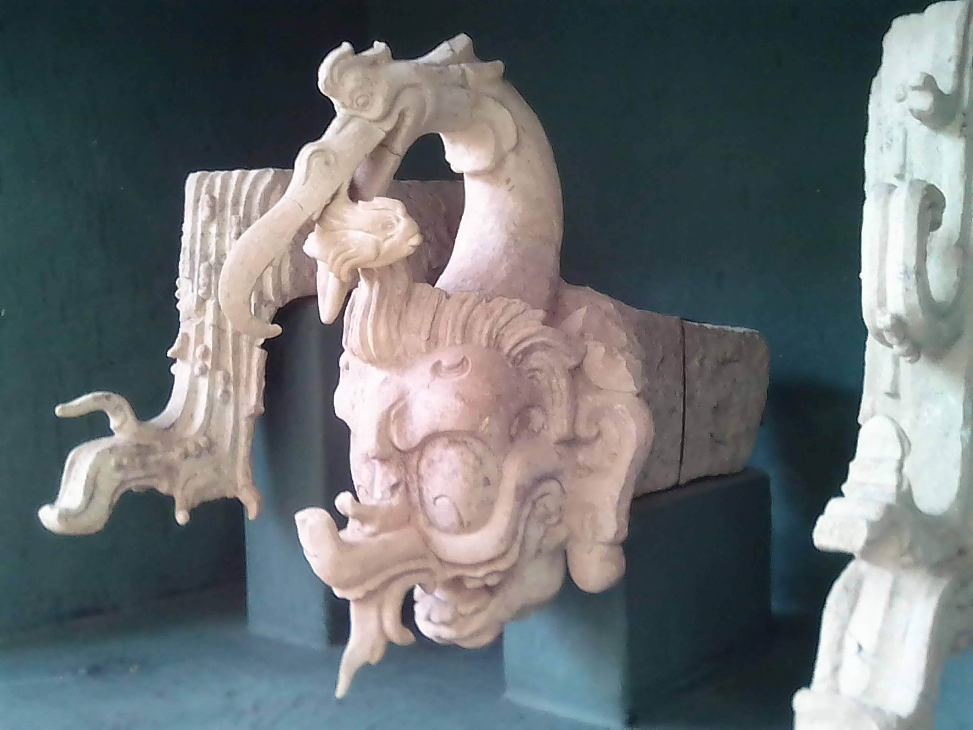 Escultura Maya bastante bien pulida y detallada del periodo Clásico medio encontrada en Copan durante los años 40, actualmente exhibida en el Museo